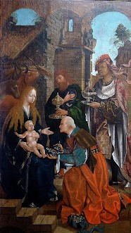 "Adoração dos Magos" (c. de 1503-1508), de Francisco Henriques, na Casa dos Patudos, em Alpiarça.